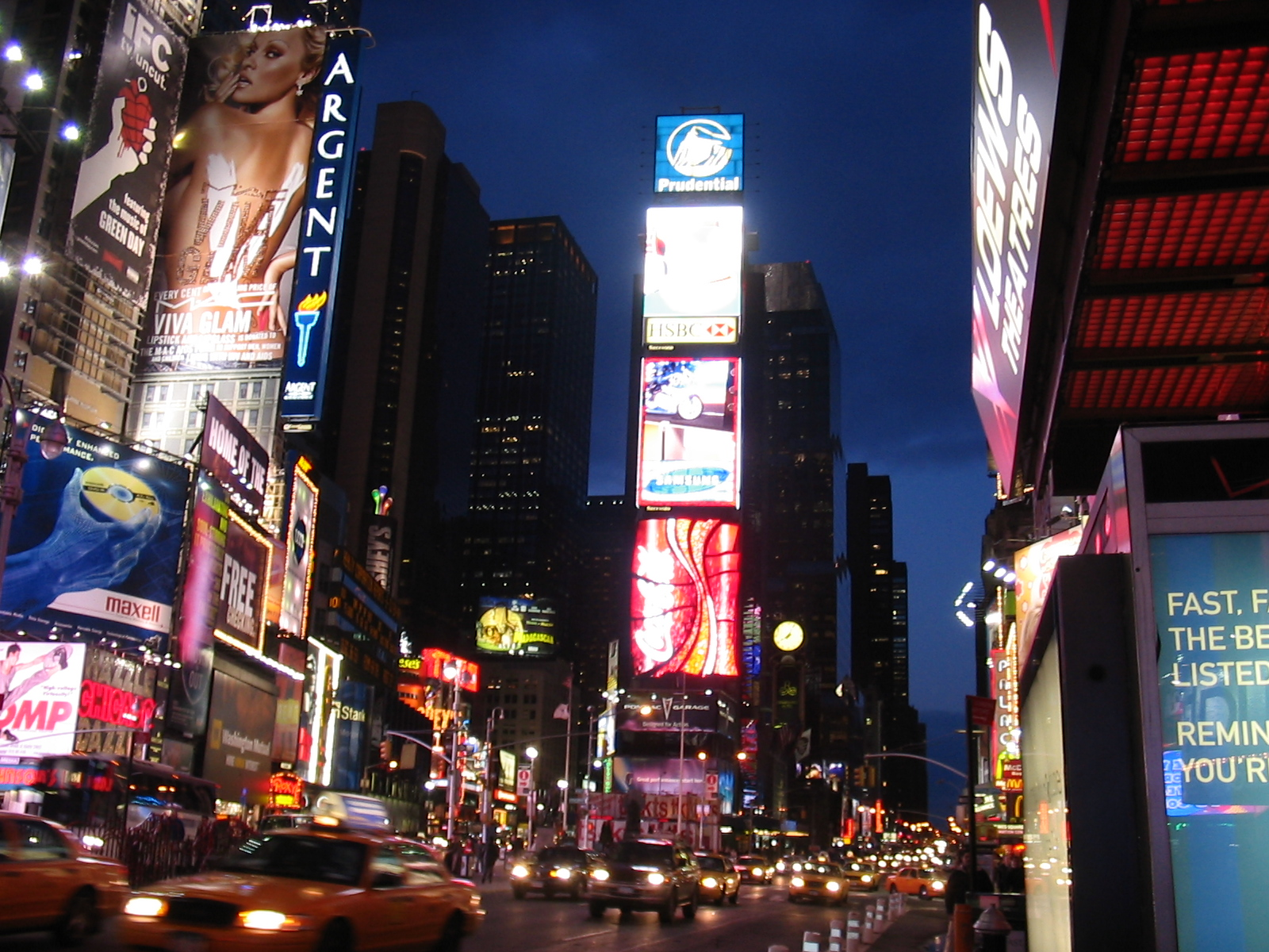 Times square at nightTimes Square